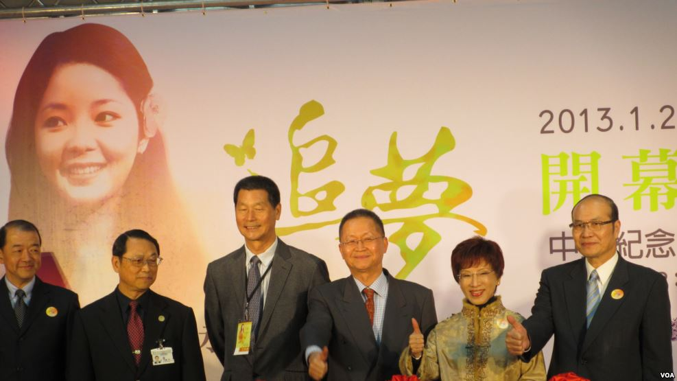 鄧麗君特展開幕記者會(美國之音張永泰拍攝)